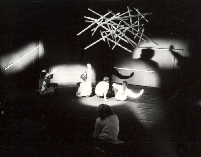 "Chambre à Musique" de Jean-Robert Sédano et Solveig de Ory, présenté au Centre Culturel du Languedoc de Montpellier (France), du 2 au 28 mai 1983. Installation musicale et visuelle interactive.